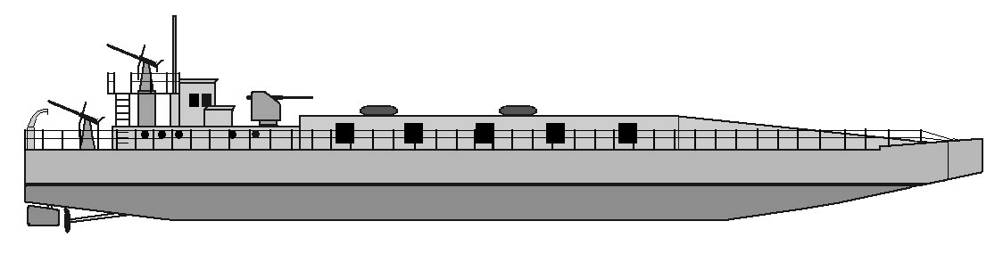 Skizze eines Marinefährprahms Typ D der deutschen Kriegsmarine.